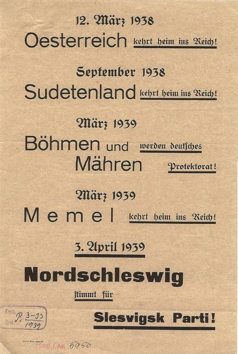 Slesvigsk Partis valgplakat fra 1939